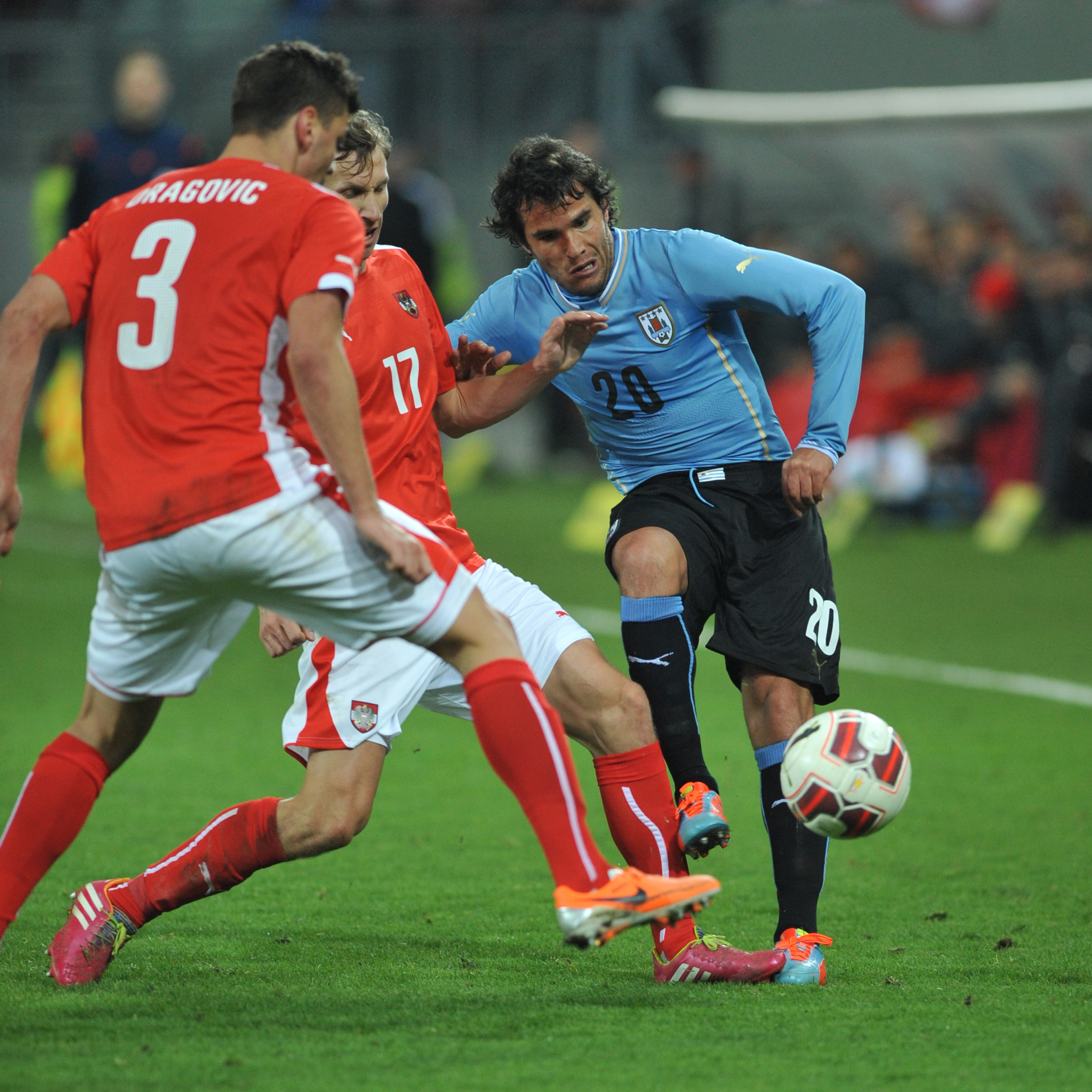 Freundschaftliches Länderspiel Österreich - Uruguay am 5. März 2014 in Klagenfurt: Álvaro González